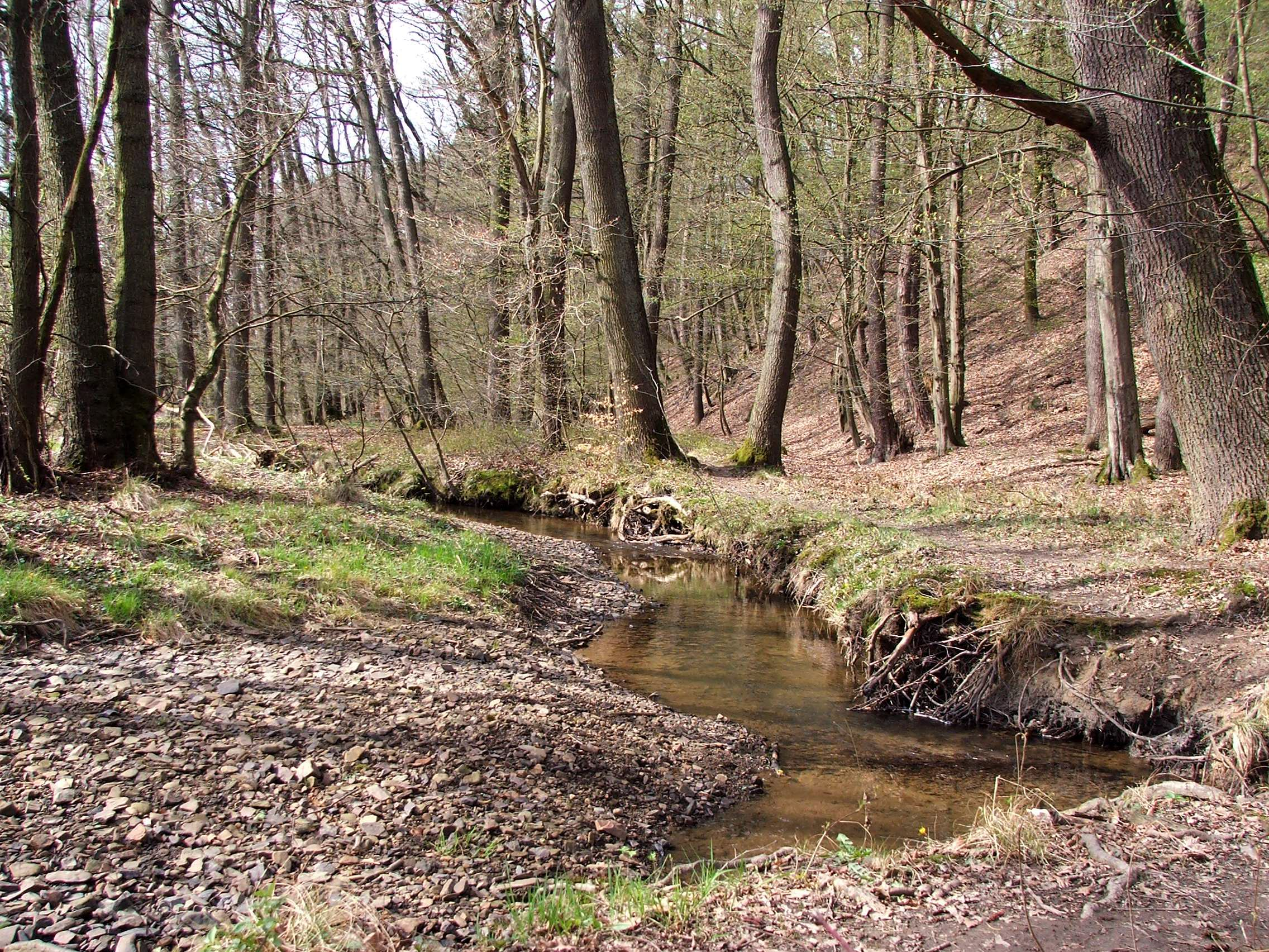 Elsebach, Schwerte im Bereich des NSG Elsebachtal